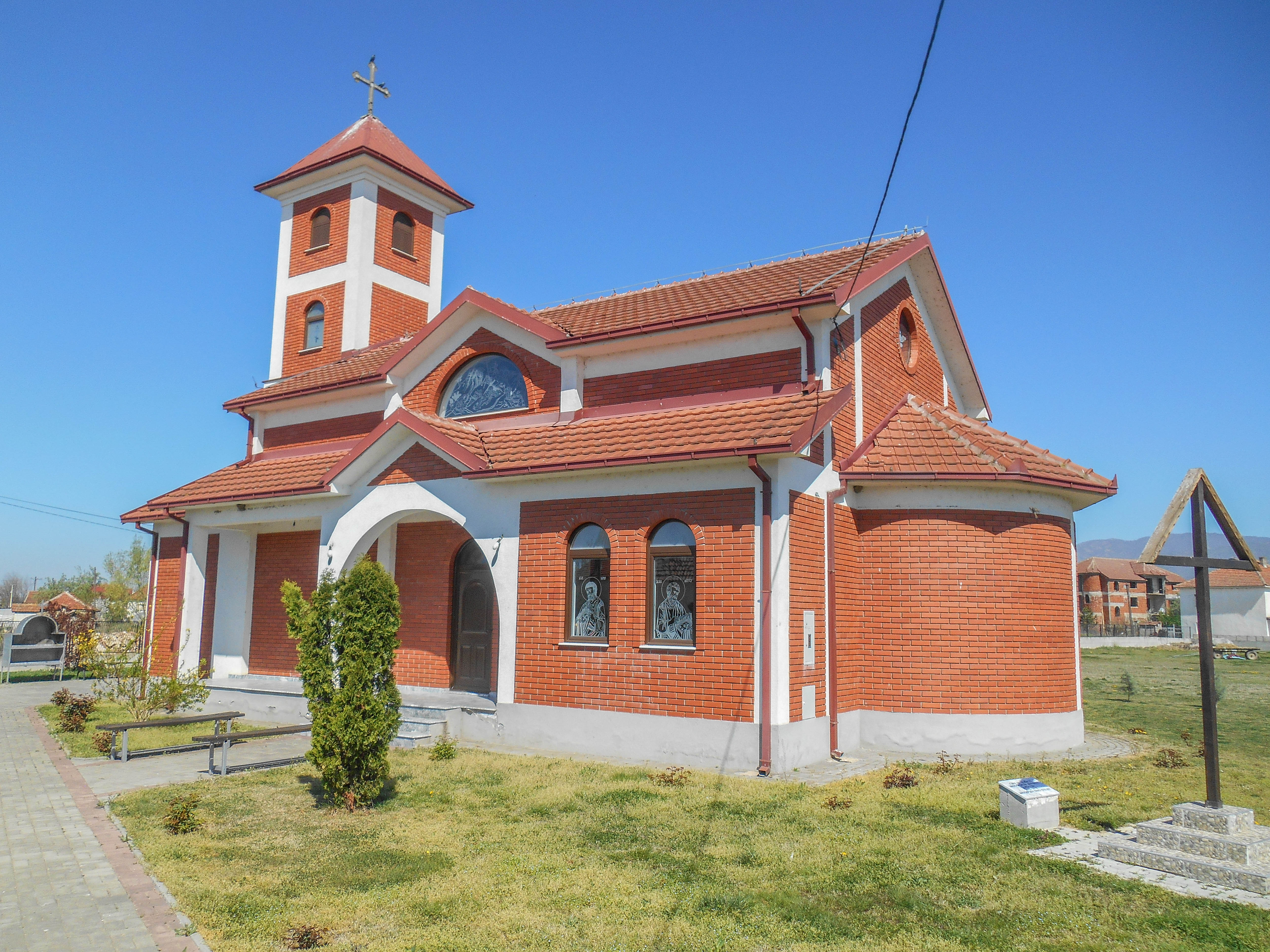 Црква „Св. Кирил и Методиј“ - Петралинци